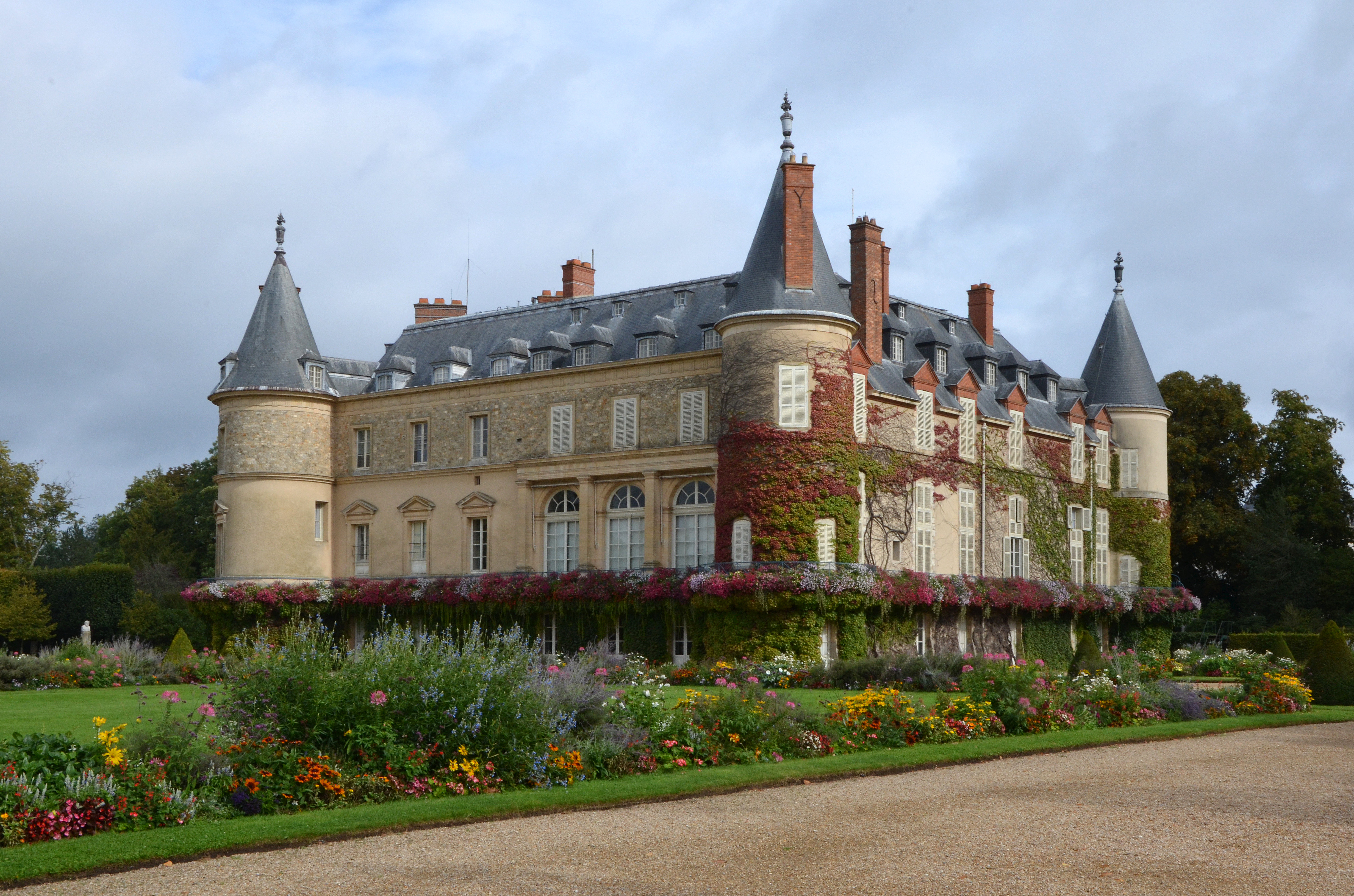 Chateau de Rambouillet, Yvelines, France